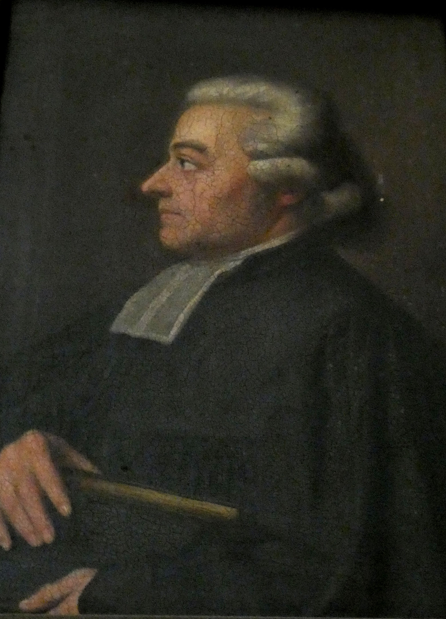 Fotografische Reproduktion (bearb.) eines Porträtgemäldes des Oberpfarrers der Marktkirche Halle Georg Christian Erhard Westphal